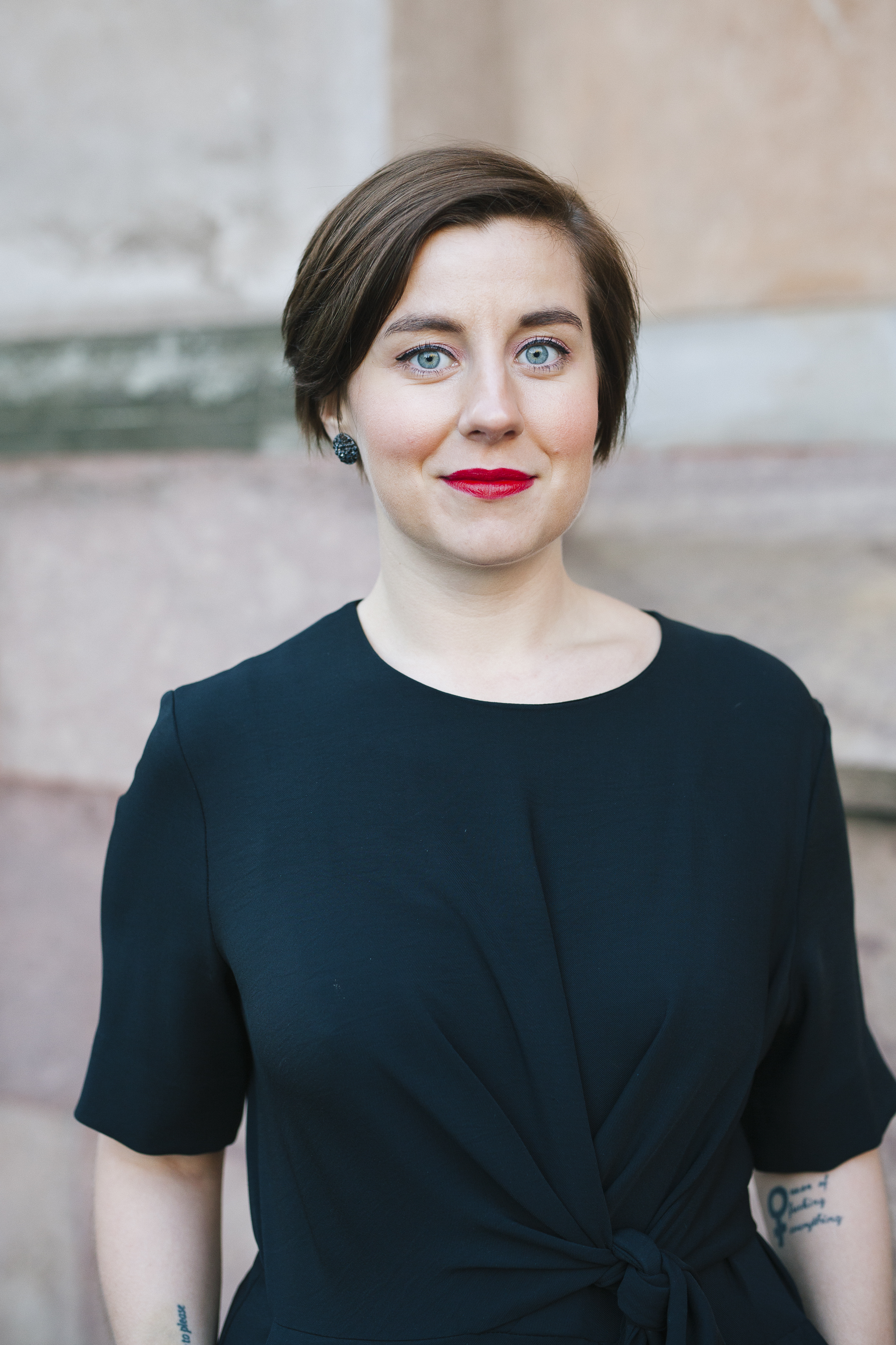 Sara Haraldsson, 2016